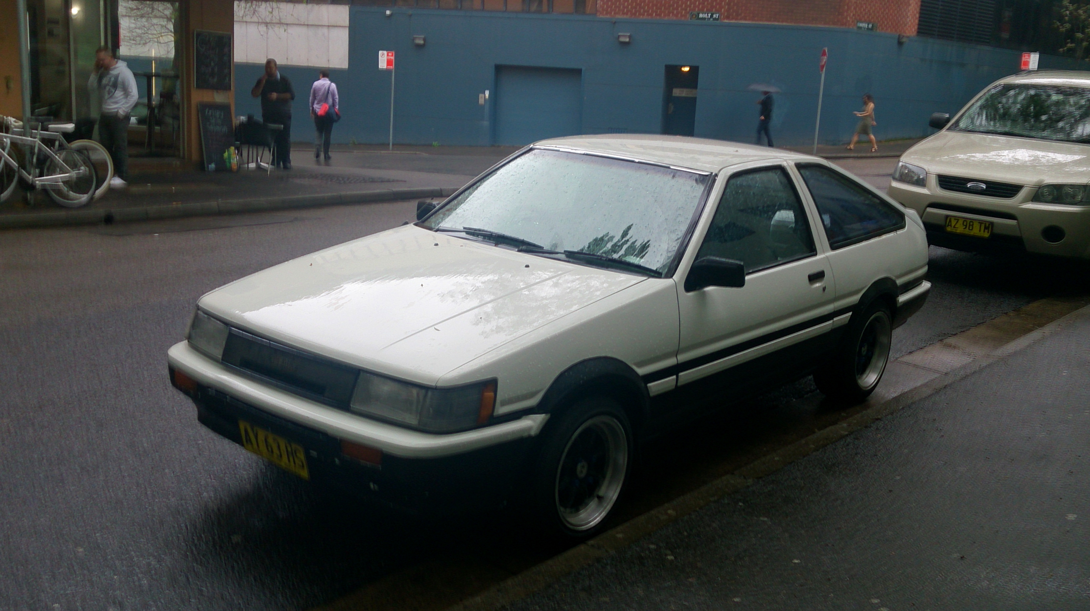 Toyota Corolla Levin GT APEX